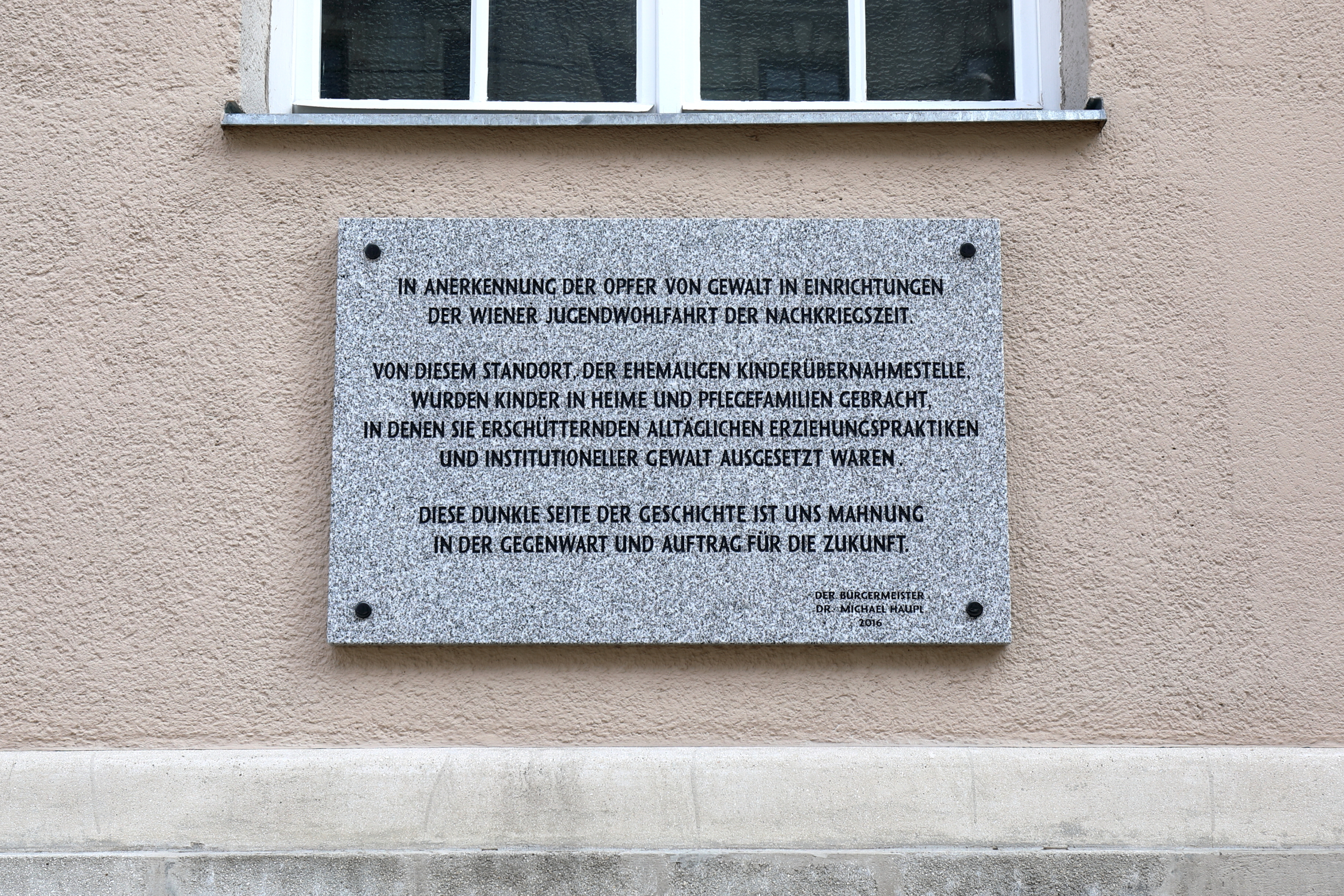 Gedenktafel rechts, leicht abseits, beim Portal des Julius-Tandler-Familienzentrums an der Ecke Lustkandlgasse/Ayrenhoffgasse im 9. Wiener Gemeindebezirk Alsergrund. In Gedenken an die Opfer der Wiener Jugendwohlfahrt wurde die Tafel 2016 an der Hauswand angebracht.